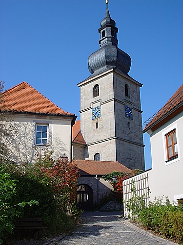 Kirche St. Walbuga in Benk